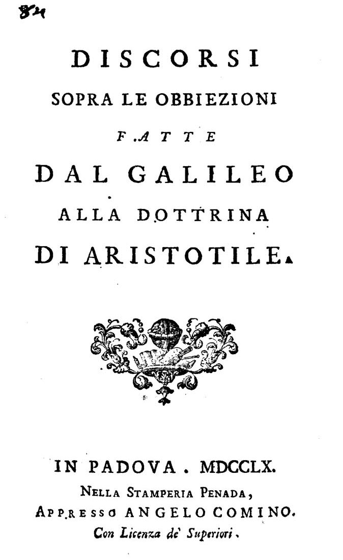 Discorsi sopra le obbiezioni fatte dal Galileo alla dottrina di Aristotile. - In Padova : nella stamperia Penada : appresso Angelo Comino, 1760. - [8], 204 p. ; 8º .